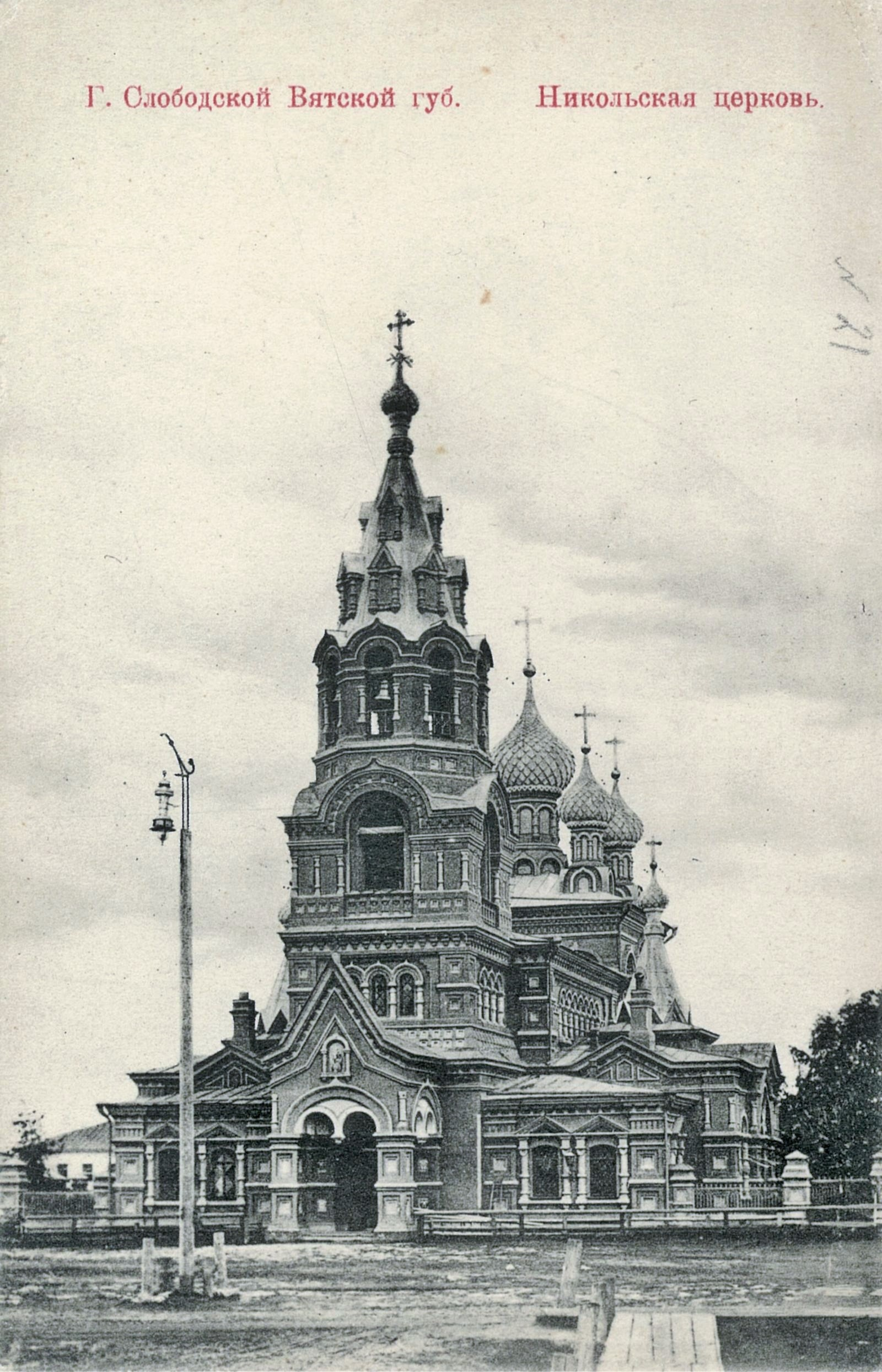 Церковь Николая Чудотворца в городе Слободском. Архитектор И.А.Чарушин.